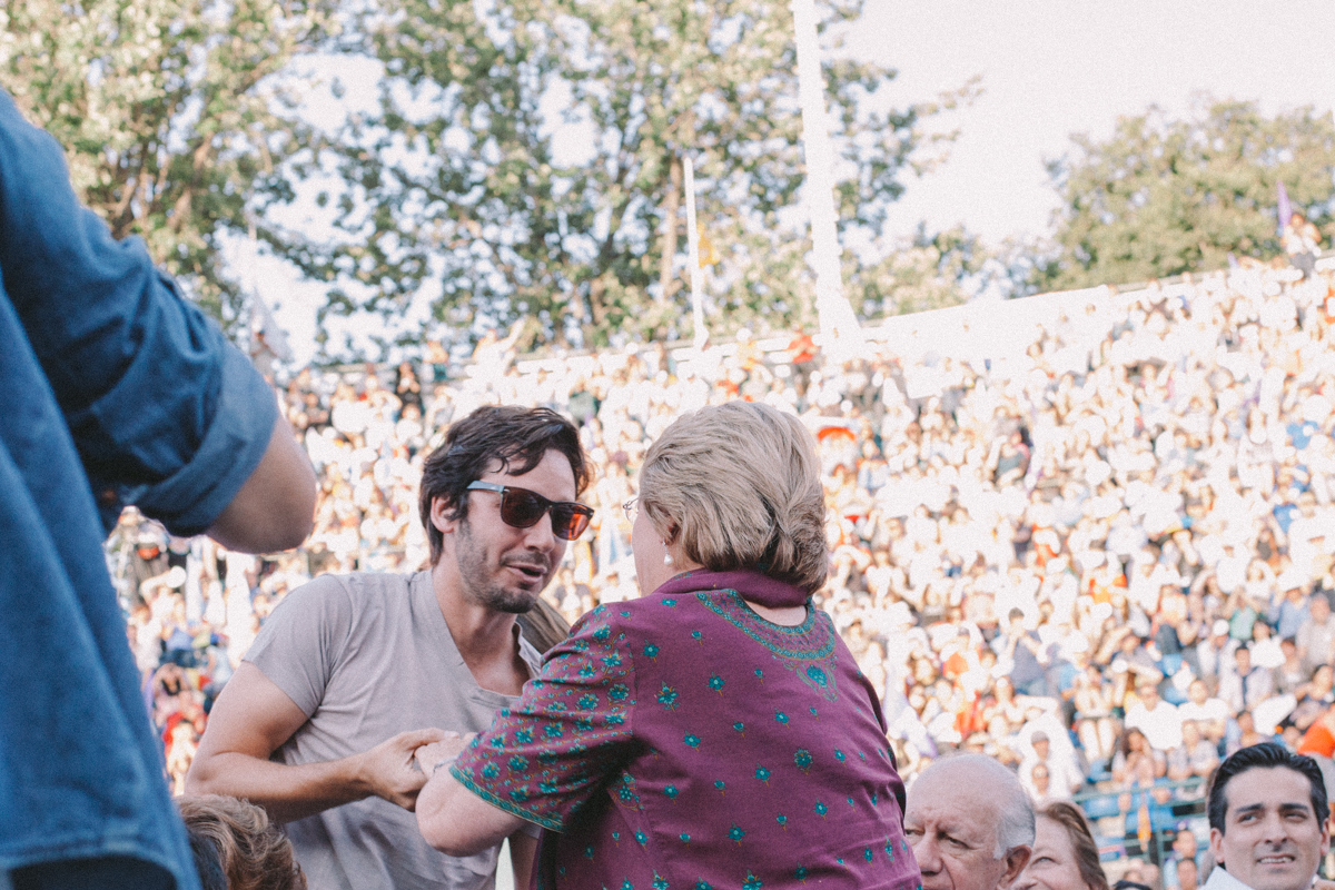 Cierre campaña presidencial en Estadio Nacional 12/12/2013